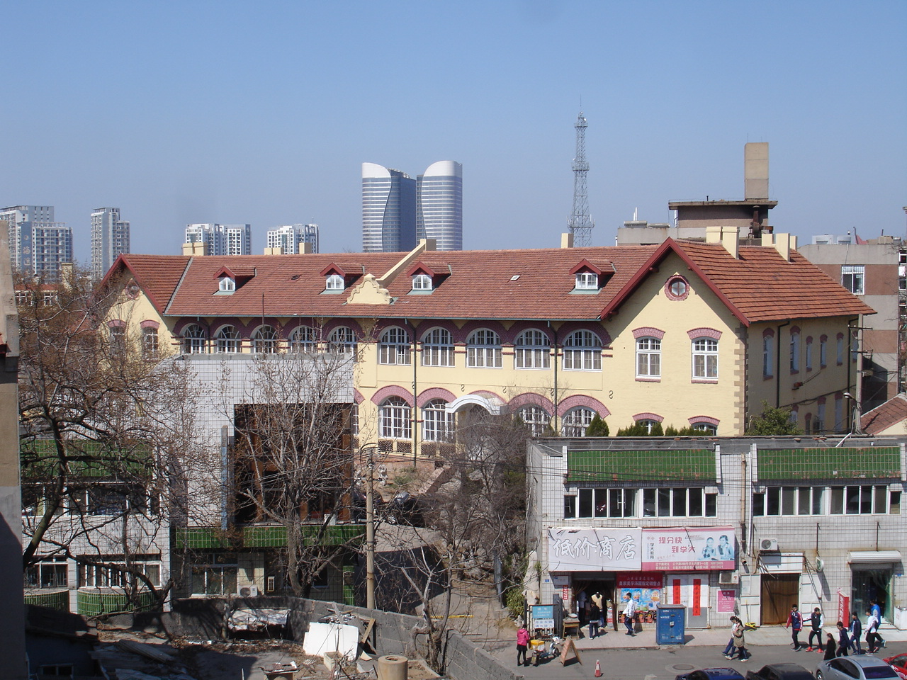 青岛柏林信义会